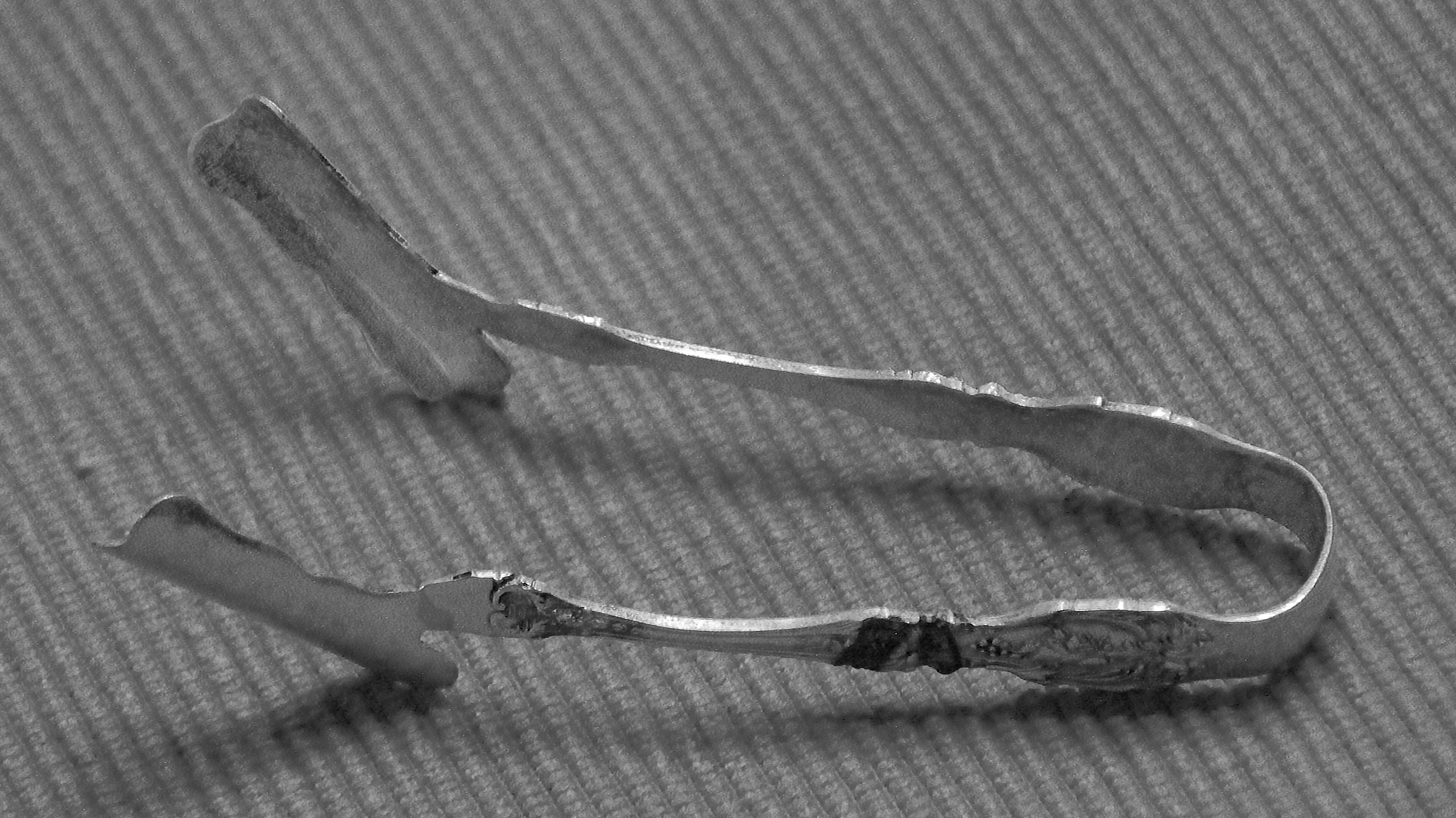 Bildinhalt: Eine silberne Spargelzange in schwarz/weiß Aufnahmeort: Worms, Deutschland